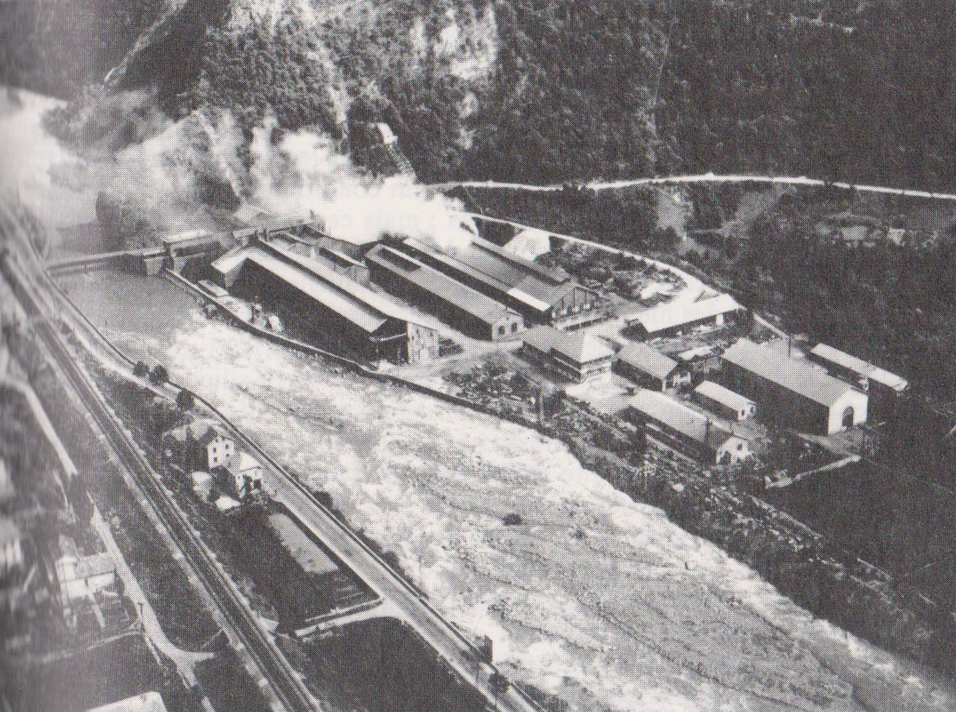 Photographie de l'usine de Montricher prise pendant l'été 1972. En 1970, la production de ferrosilicium y a atteint 17 000 tonnes (contre 10 000 tonnes en 1960). Celle-ci se fait dans les anciens fours de production de carbure de calcium, rendus obsolètes par la filière pétrochimique.